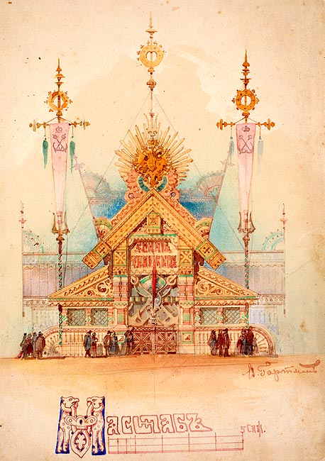 Viktor Hartmann (1834-1873). Design for the Naval department of Russia's pavilion at the Vienna World Fair, 1873. Виктор Гартман (1834—1873). Морской отдел Русского павильона на Всемирной выставке в Вене. 1873 г. Проект входной части. Картон, тушь, акварель. 29х22